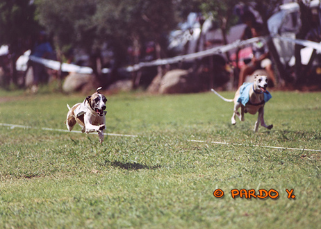 כלבים מגזע וויפט במרוץ. צילום: יגאל פרדו